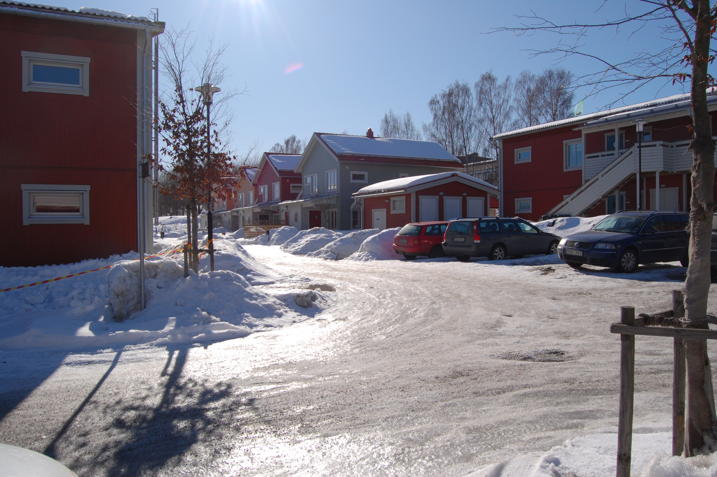 Ribby ängar i tätortsdelen Ribbyberg